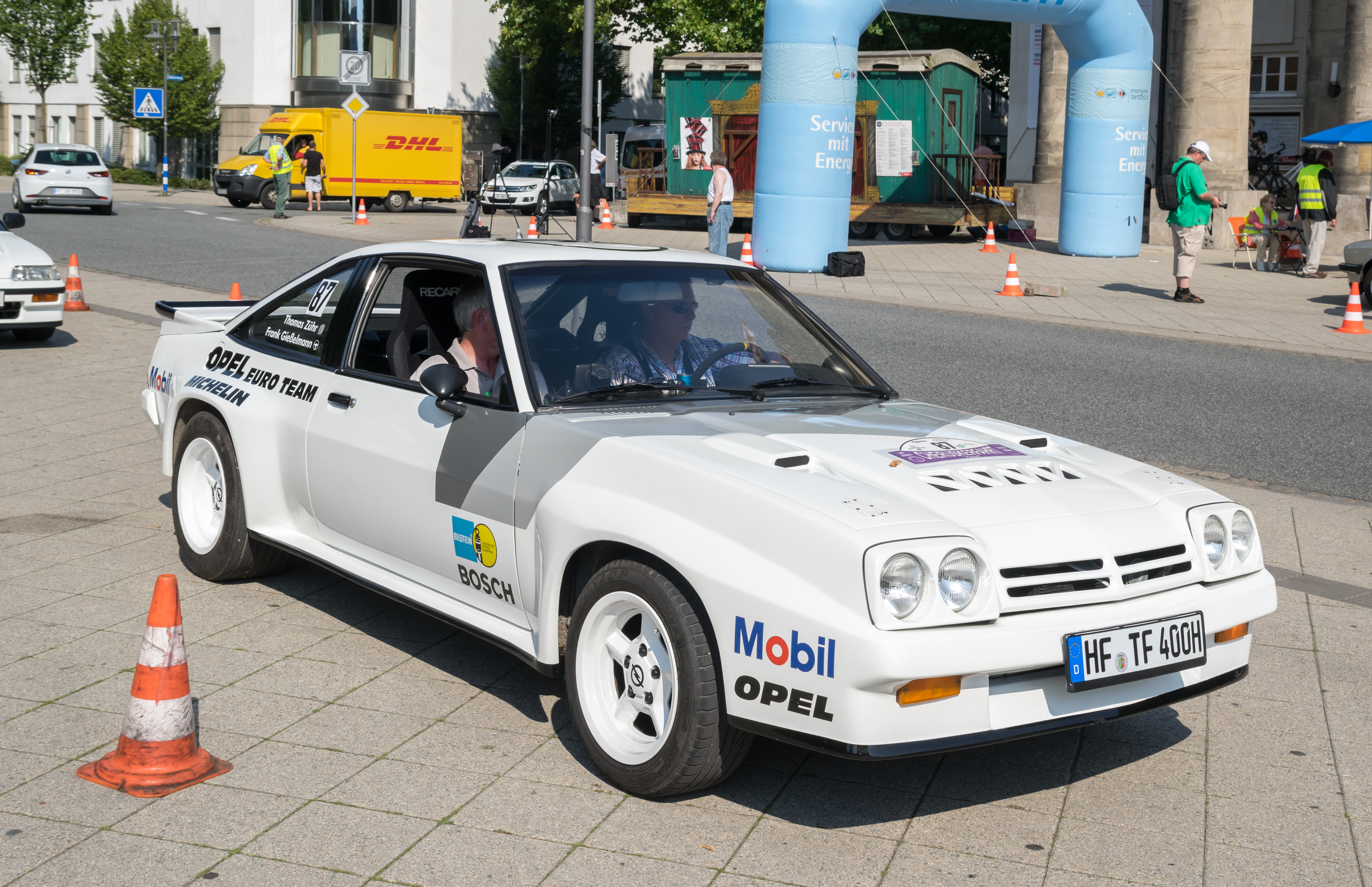 Opel Manta 400, Baujahr 1984, bei der Cheruskerfahrt 2016, Startpunkt am Theater in Detmold